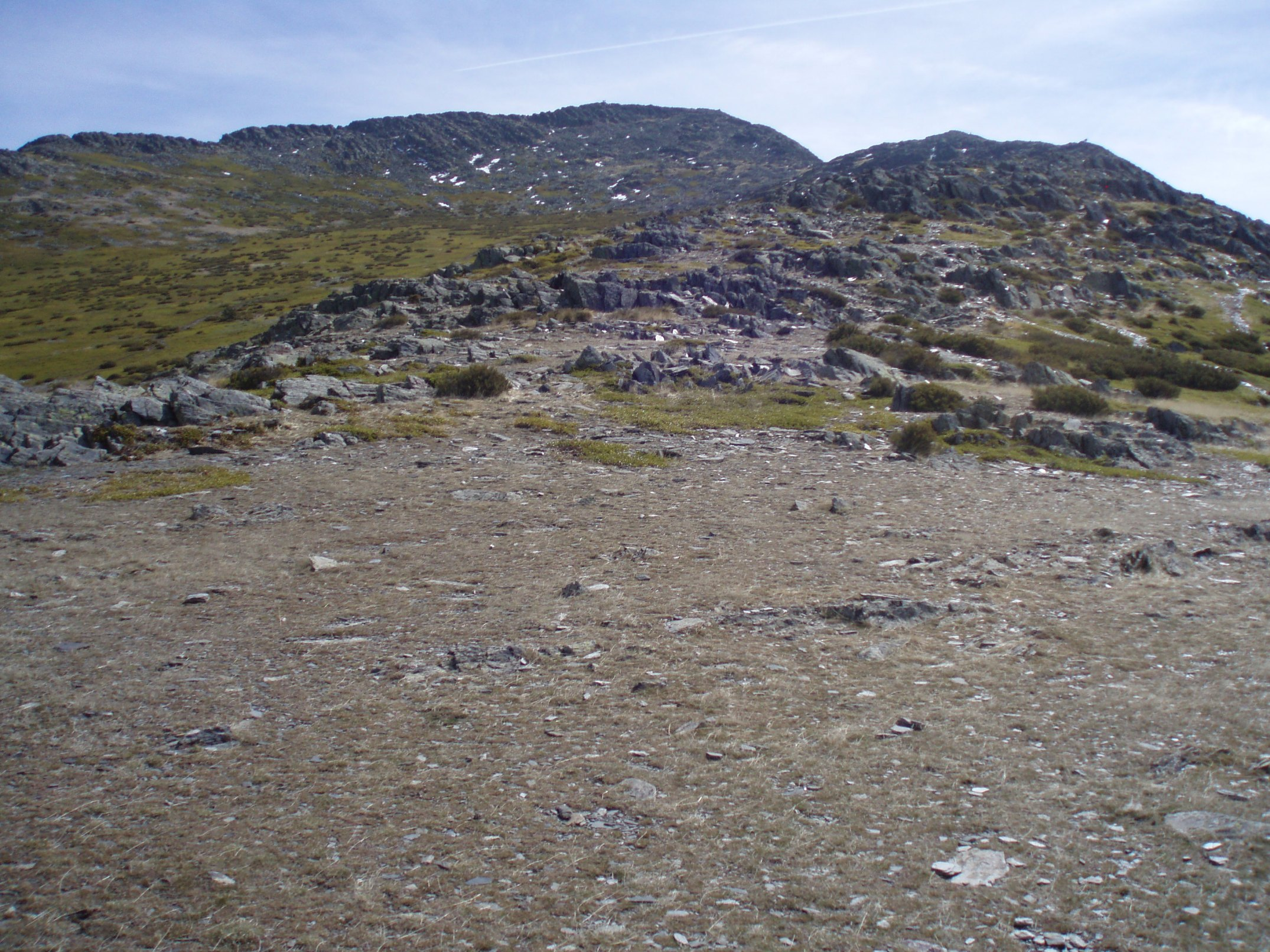 Cara norte del Pico Ocejón (Sierra de Ayllón, España).